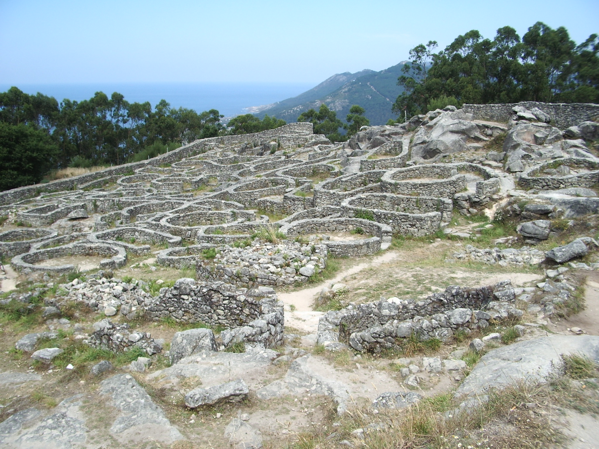 Castro de Santa Trega/Castro de Santa Tecla (Galicia, España)